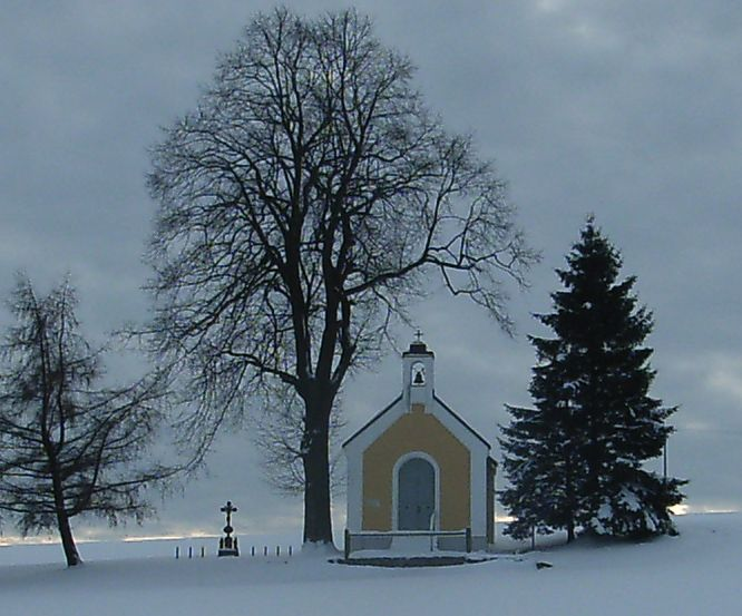 Setterlkapelle an der Schönseer Straße zwischen Weiding und Preißhof